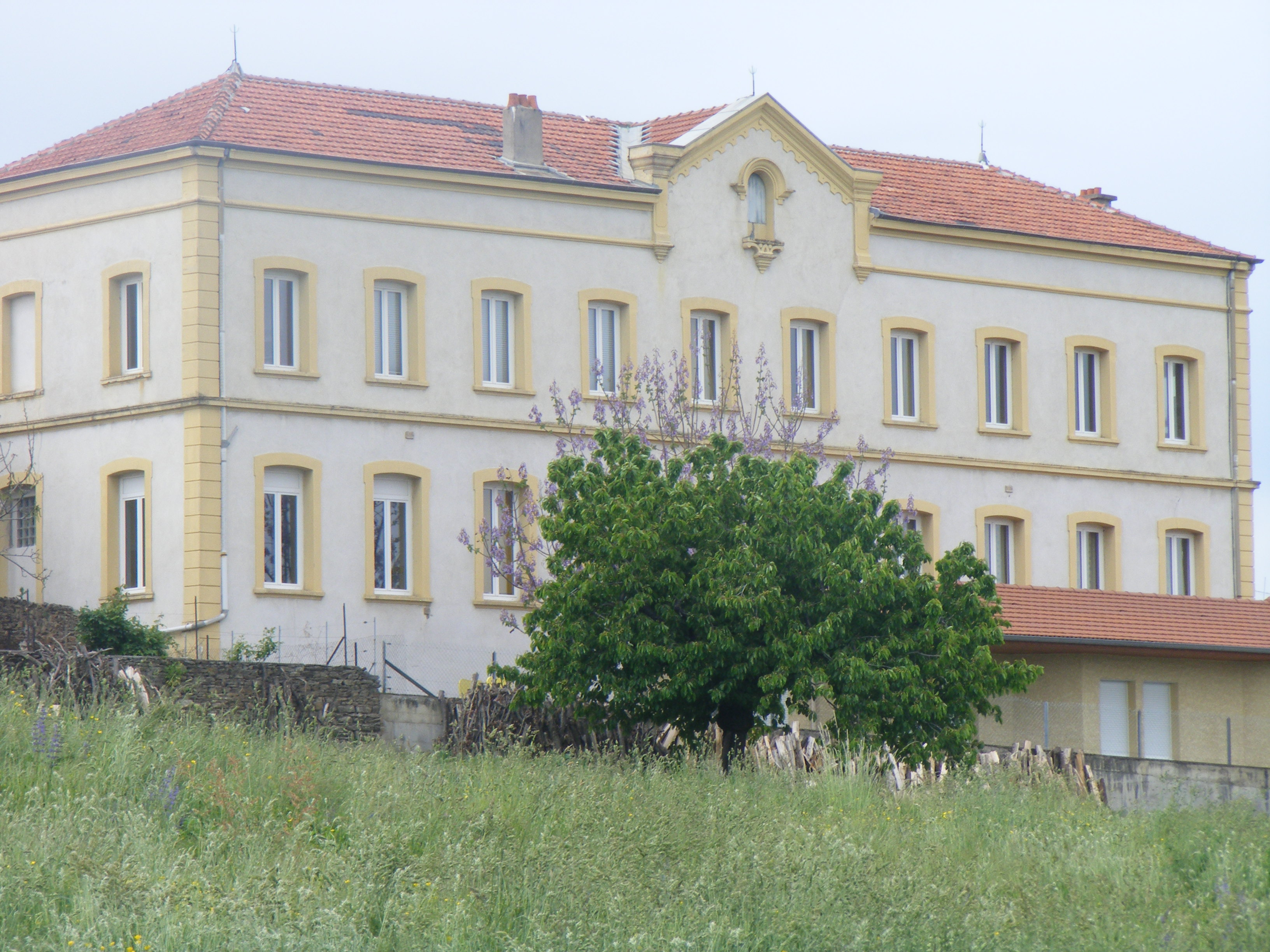 Ecole privée "Les Marelles"